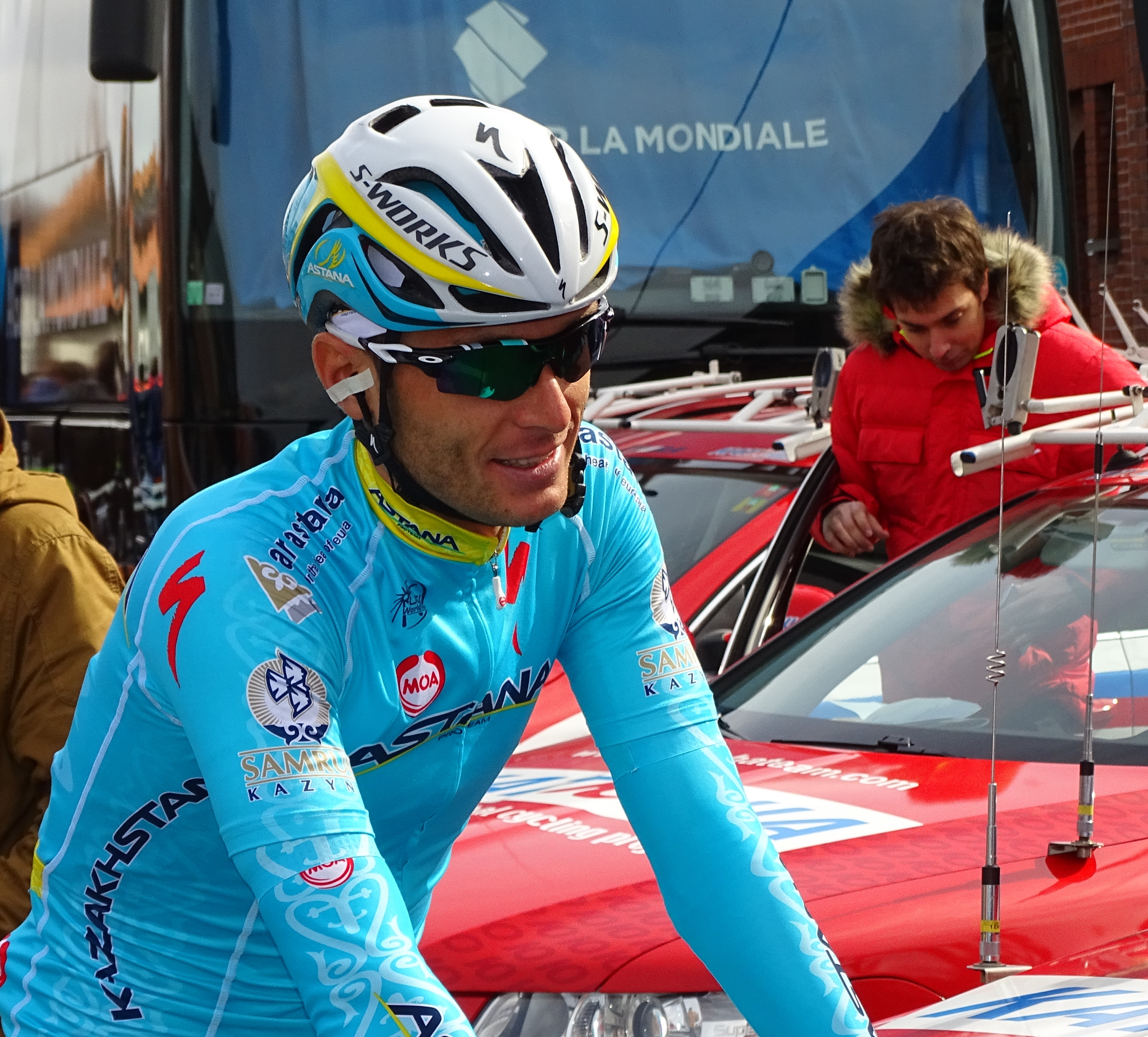 Reportage réalisé le vendredi 27 mars à l'occasion du départ et de l'arrivée du Grand Prix E3 2015 à Harelbeke, Belgique.